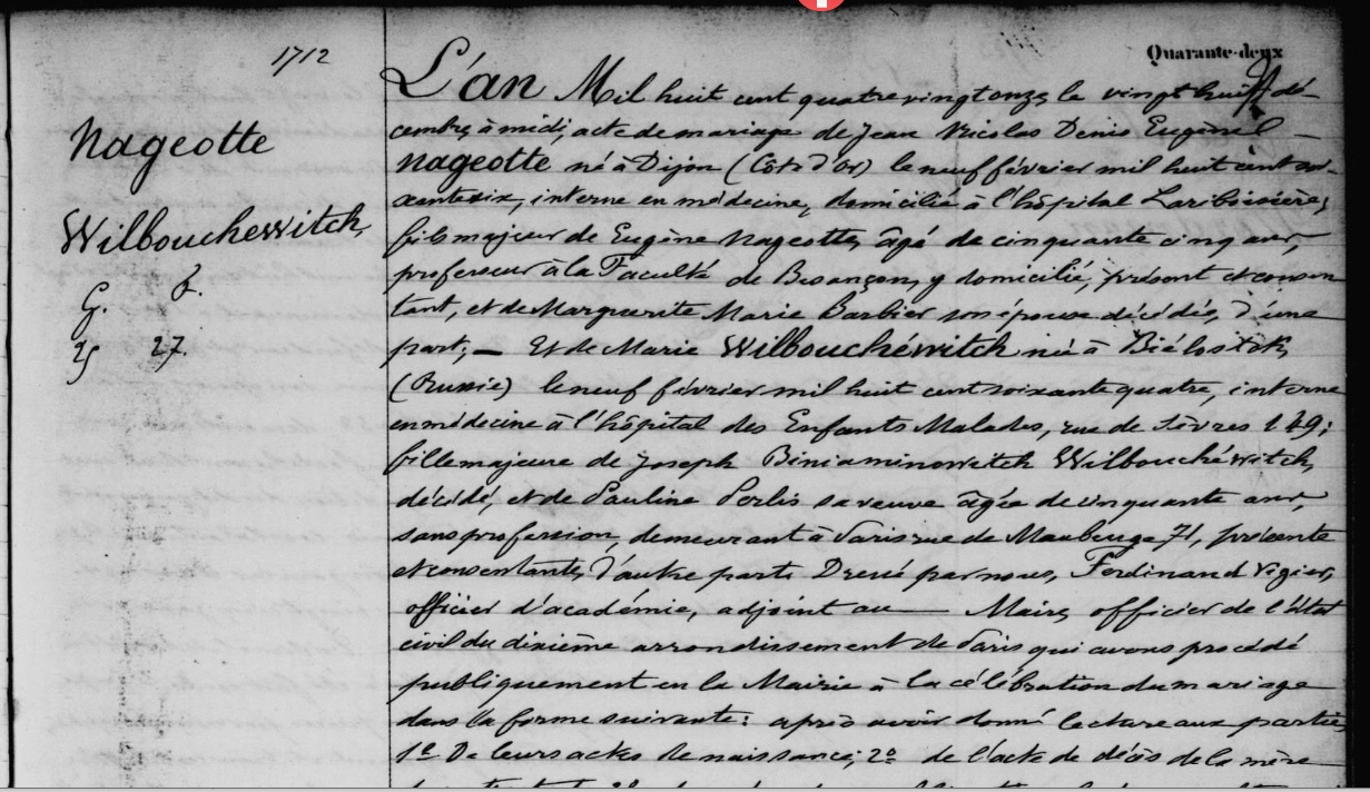 1891.12.28 - Paris 10 - Acte de mariage Nageotte-Wilbouchewitch